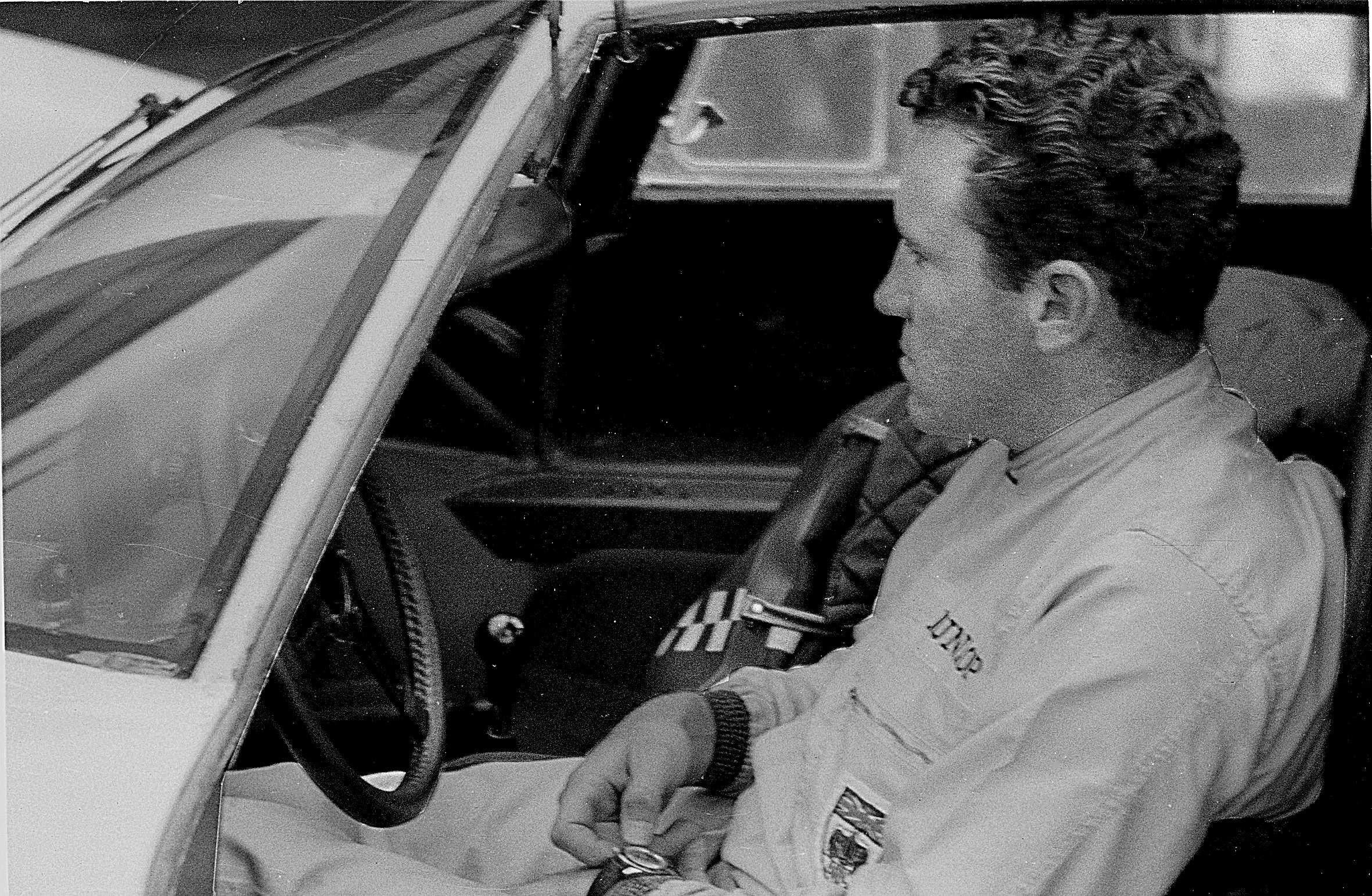 Paul Hawkins im Porsche 906 während des Trainings zum 1000-km-Rennen im Fahrerlager des Nürburgrings